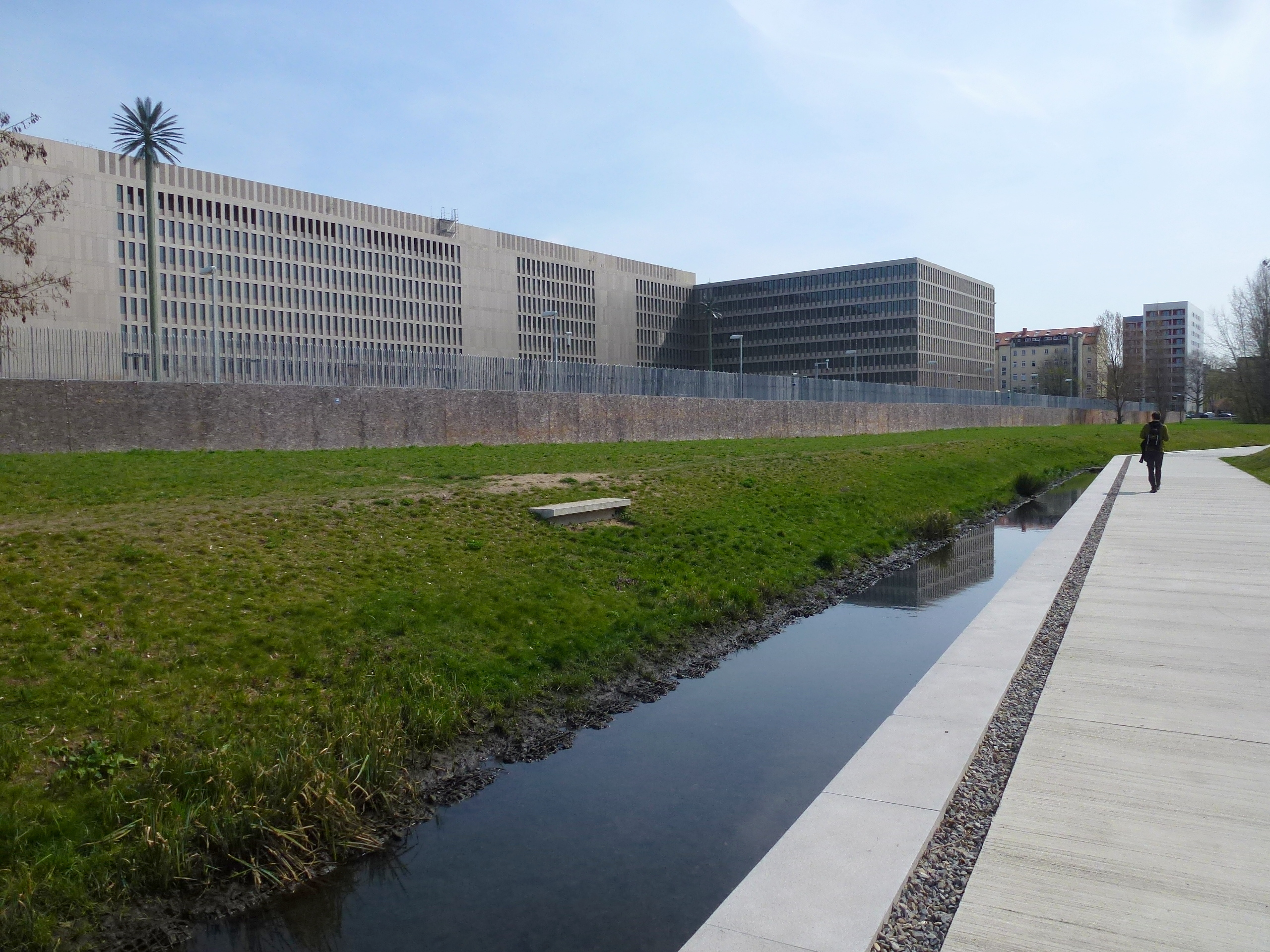 Berlin-Mitte BND-Gebäude Grünzug Südpanke